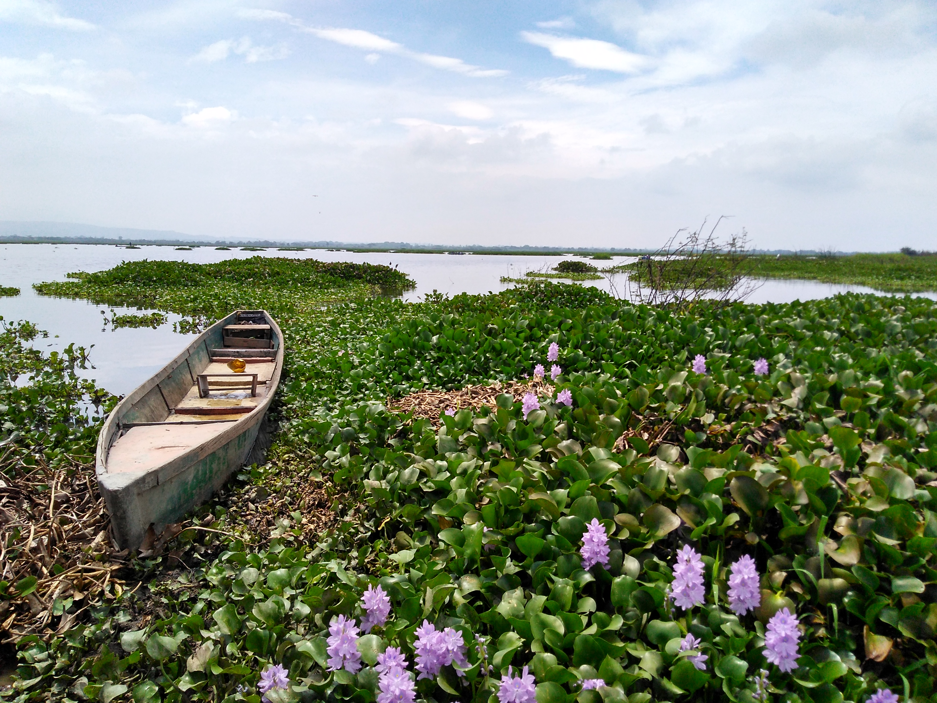 Distrito Regional de Manejo Integrado Laguna de Sonso Esta fotografía fue tomada en el municipio colombiano con código 76111.